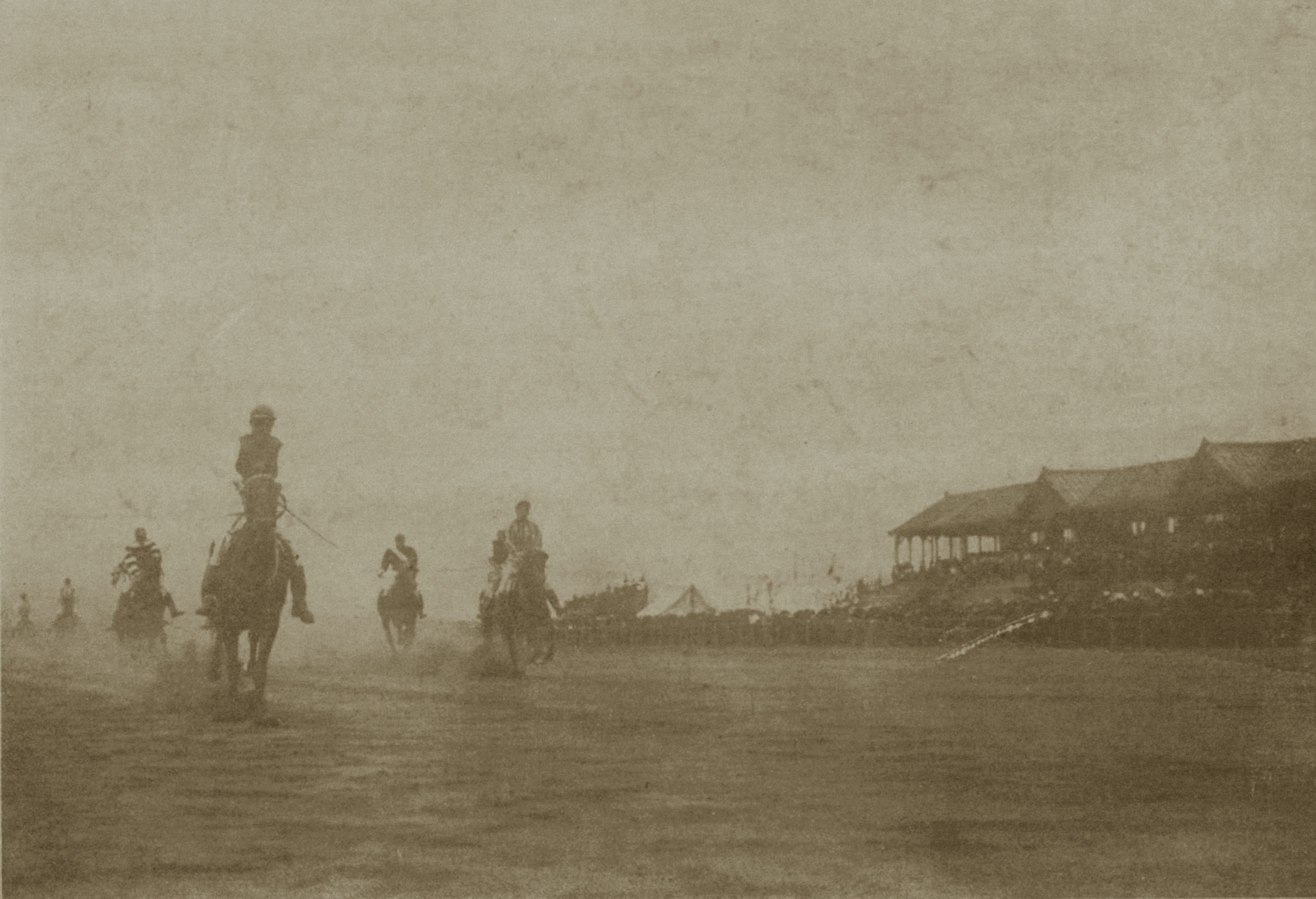 池上競馬場レースシーン